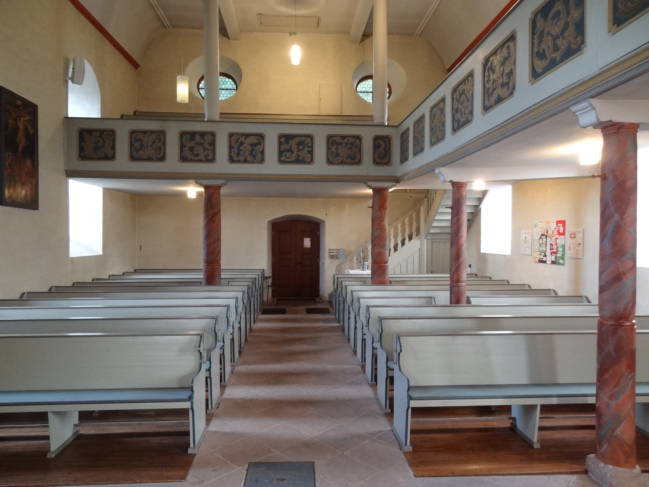 Evangelische Kirche (Fauerbach vor der Höhe)